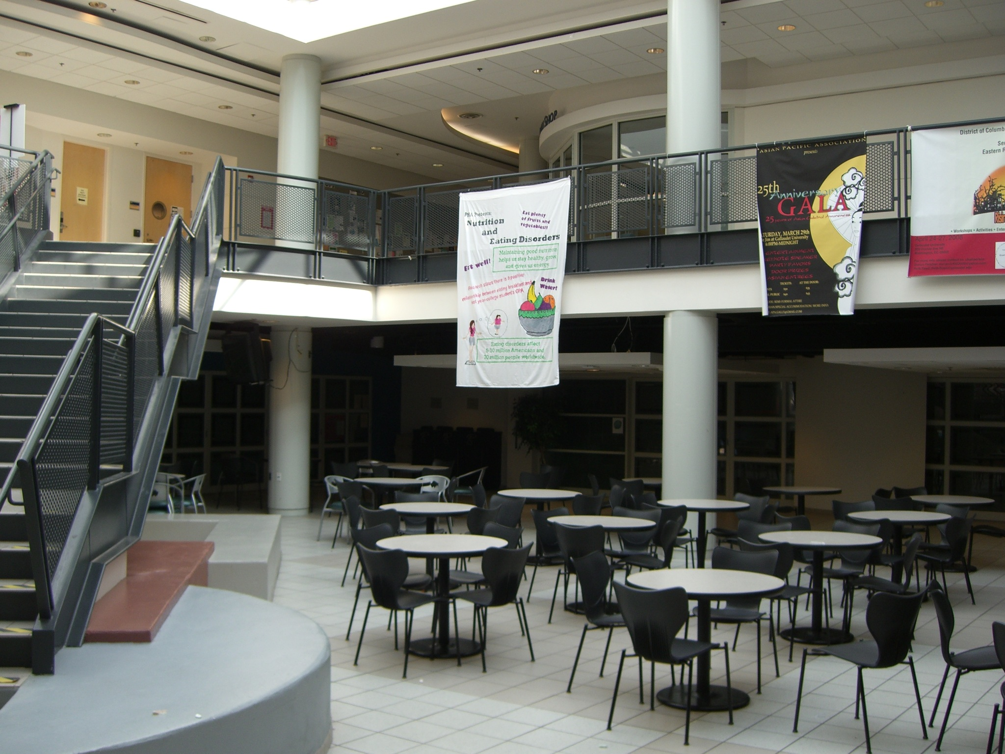 Gallaudet union